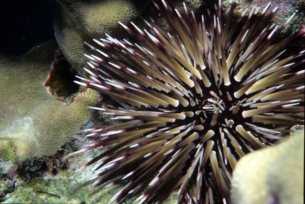 Sea urchin, Fiji